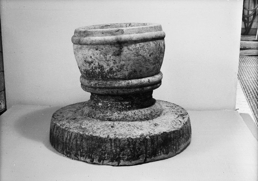 Dopfunt, 1100-talet. Kategori: (04) DopfuntarDopfunt, 1100-talet.